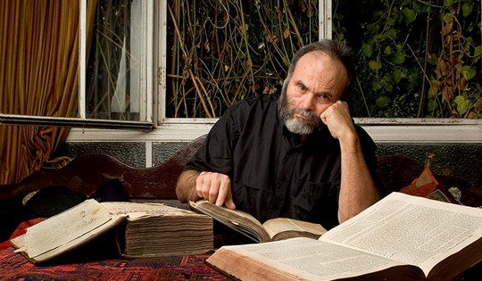 פרופסור למחשבת ישראל יהודה ליבס